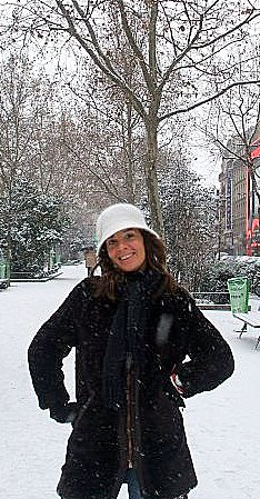 Ediht Hermida